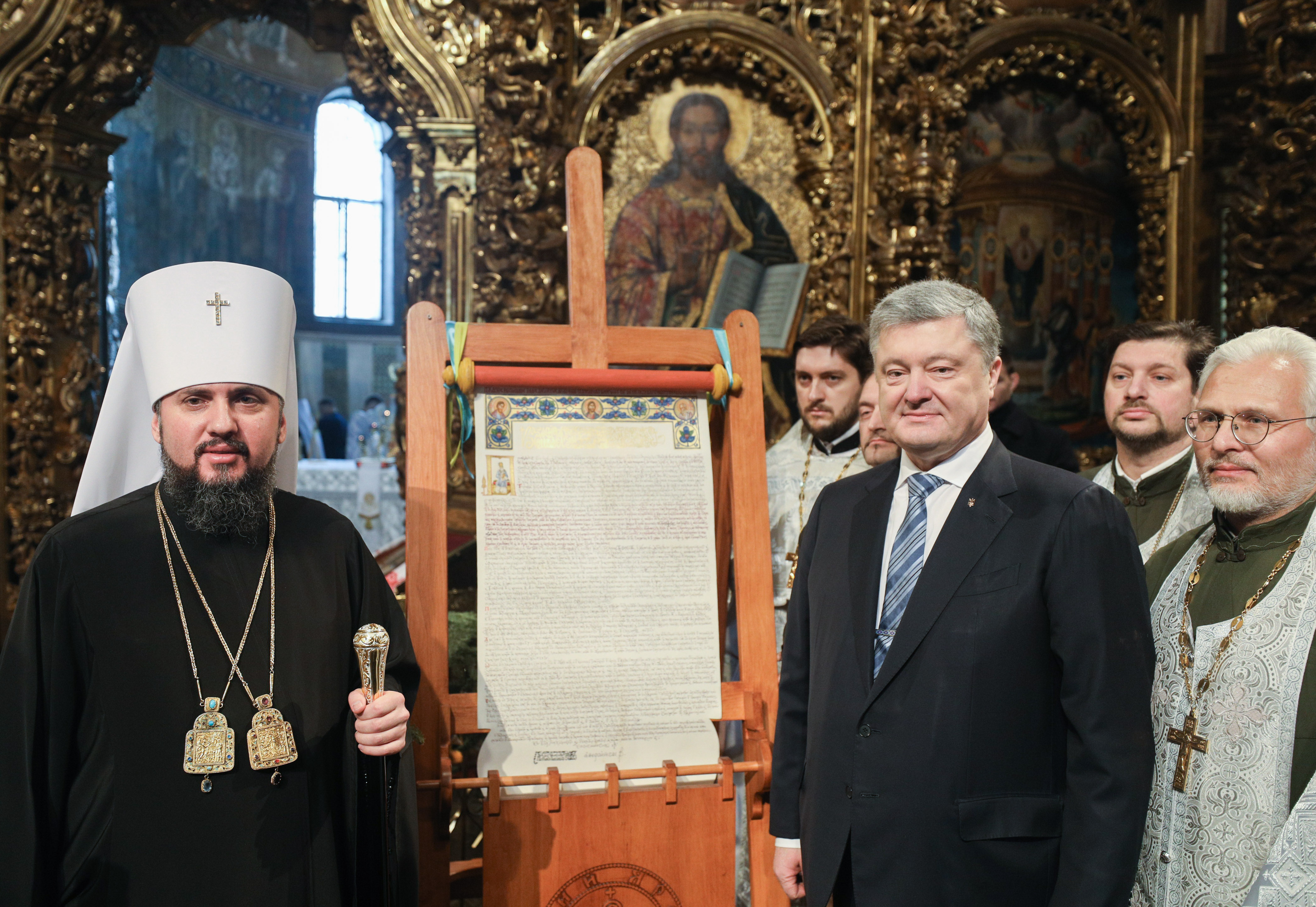 "Томос про автокефалію Православної Церкви України встановлено в Софії Київській"[1]